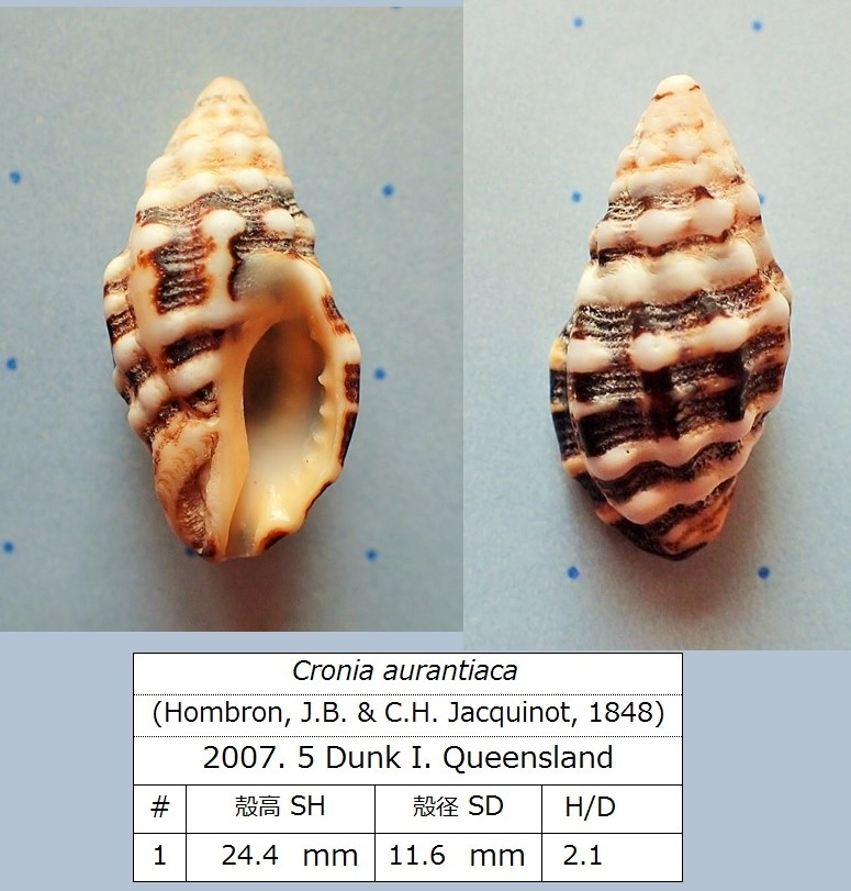 オーストラリア北東のダンク島でひろった貝殻。海岸にたくさん落ちていた。ヒメヨウラクが近縁かと思われる。